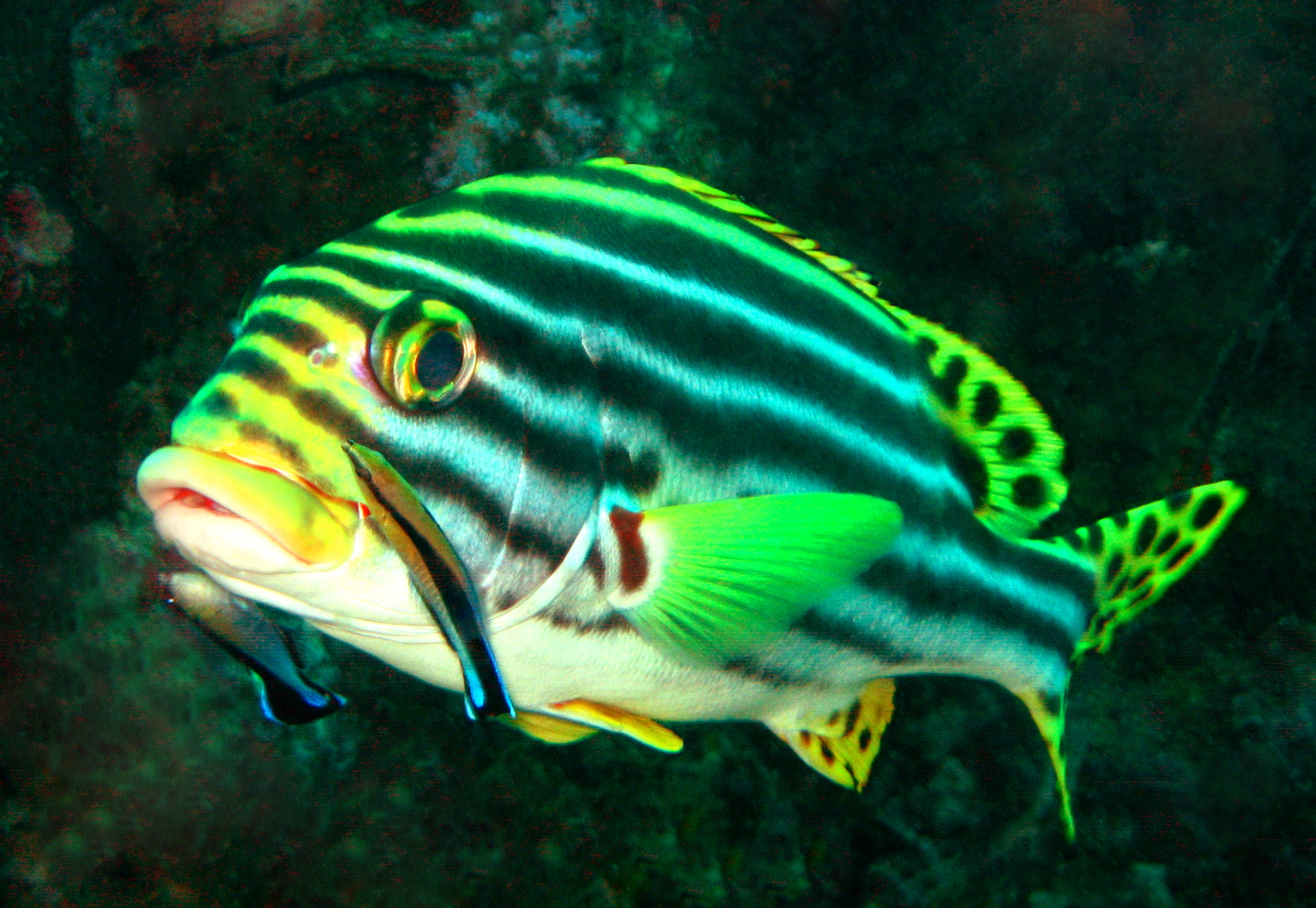 Orientalischer Süßlippfisch (Plectorhinchus orientalis). Tauchgang ca. 15m Tiefe, Koh PhiPhi, Thailand. – Dieser „sweetlip“ wird gerade bei einer Putzerstation von 2 Putzerfischen bedient, diese entfernen diverse Bakterien und Parasiten von Haut und Kiemen.